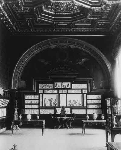 Зал Фарнезе музея Училища. Фото 1896 года. На заднем плане мраморный рельеф итальянского скульптора XVI века Антонио Ломбарди